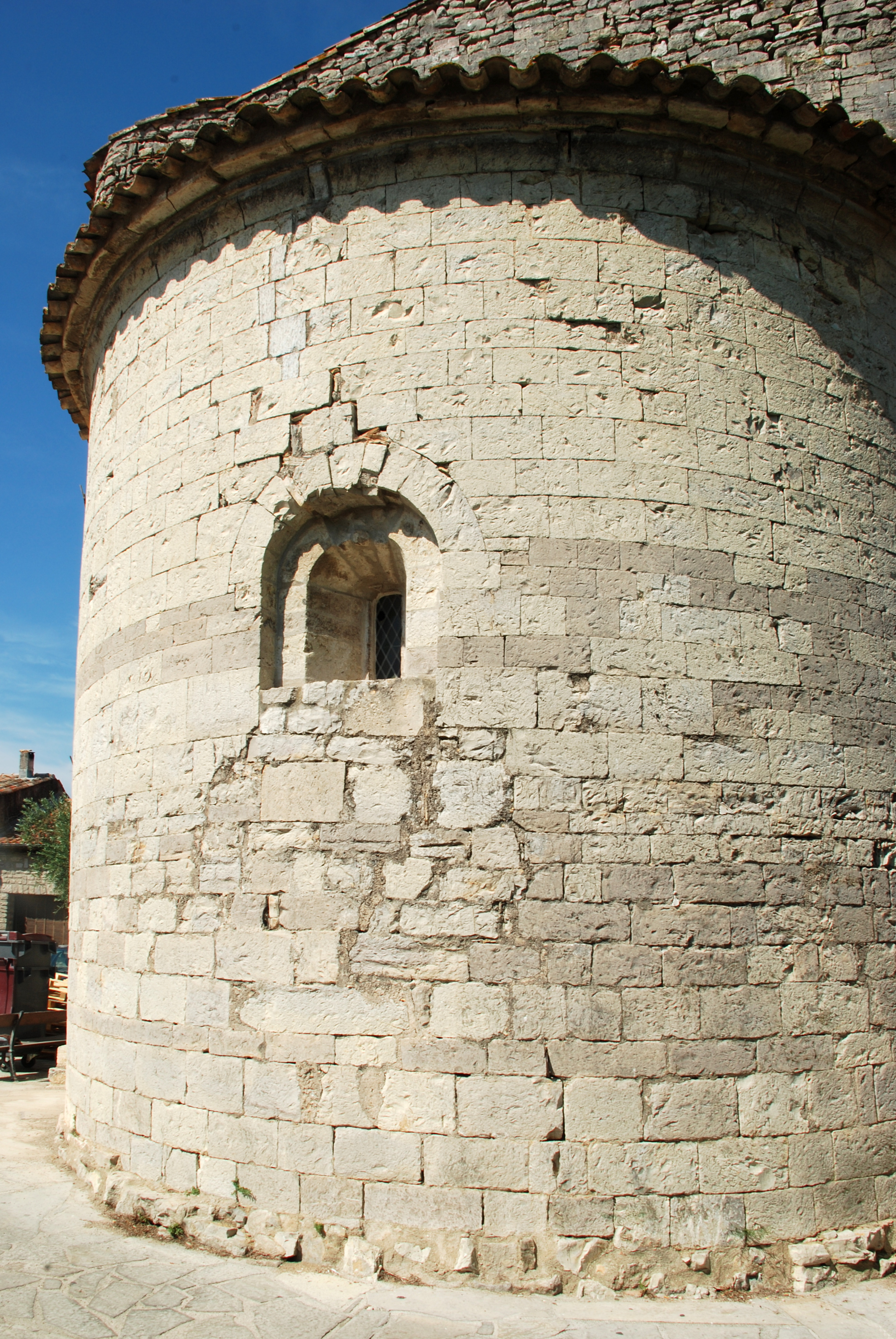 France - Languedoc - Hérault - Église de Sainte-Croix-de-Quintillargues